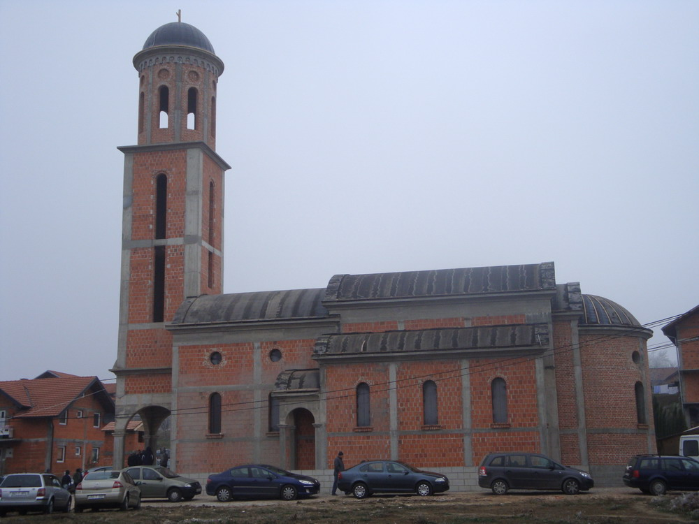 Изградња Храма Св. архангела Михаила у Шарговцу